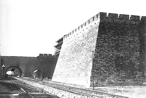 1902年的北京内城崇文门瓮城